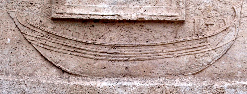 Schiffsabbildung auf einem Sarkophag in Olympos